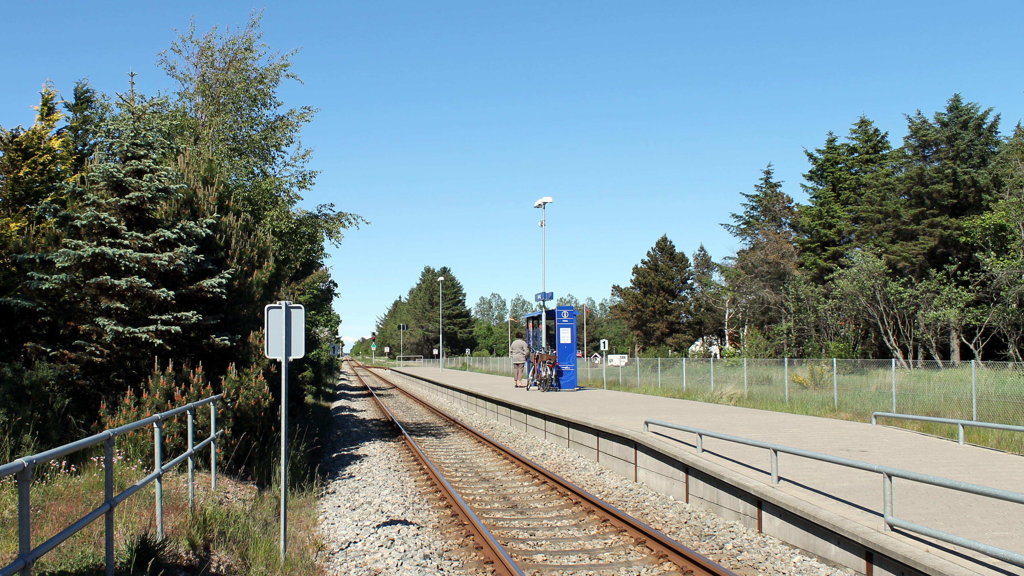 Skagensbanen - Hulsig Trinbræt